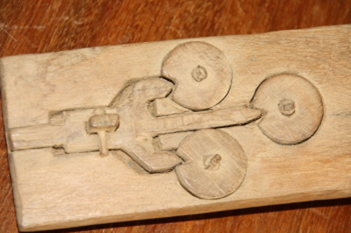 Mécanisme boîte à secret